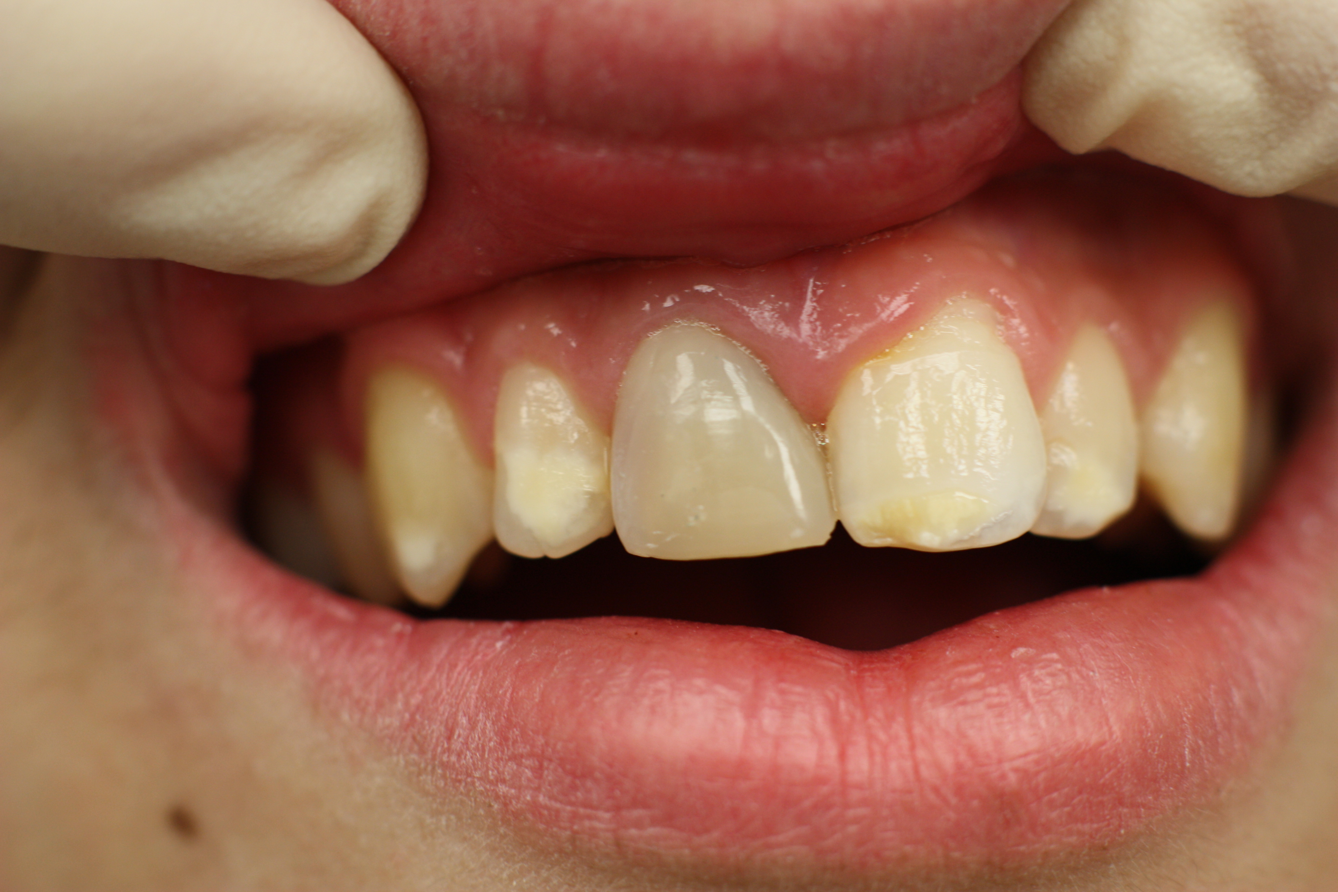 Dental traumas; Frontzahntrauma; Alter: 16 Jahre; Zahn 11; Faustschlag, Kronenfraktur mit Pulpaeröffnung, Wurzelbehandlung; Kunststoffaufbau ohne Wurzelstift Kunststoffaufbau 11, fertig modelliert